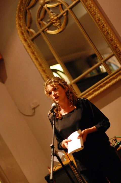 Anna Stothard at Bookstock.